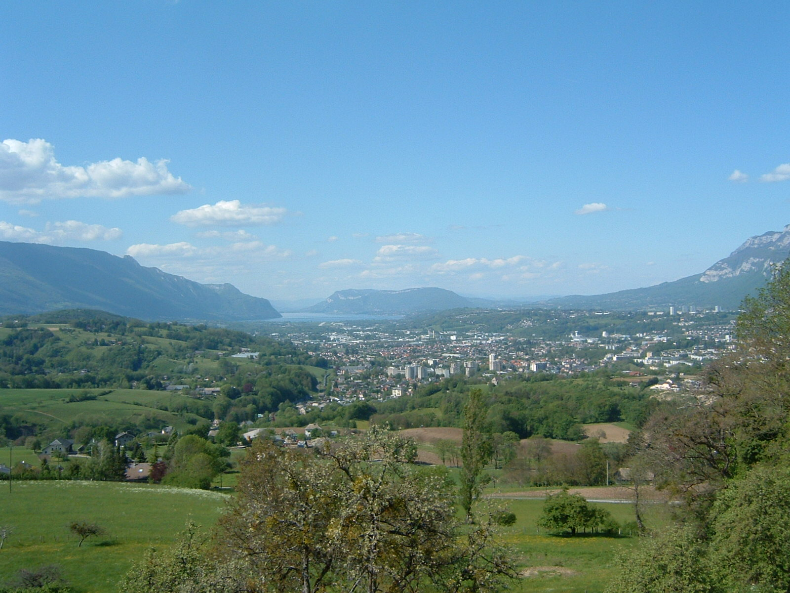 Vue depuis les hauteurs de Saint Cassin.